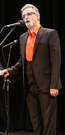 حمید غلامعلی در مراسم نکوداشت ژاله علو